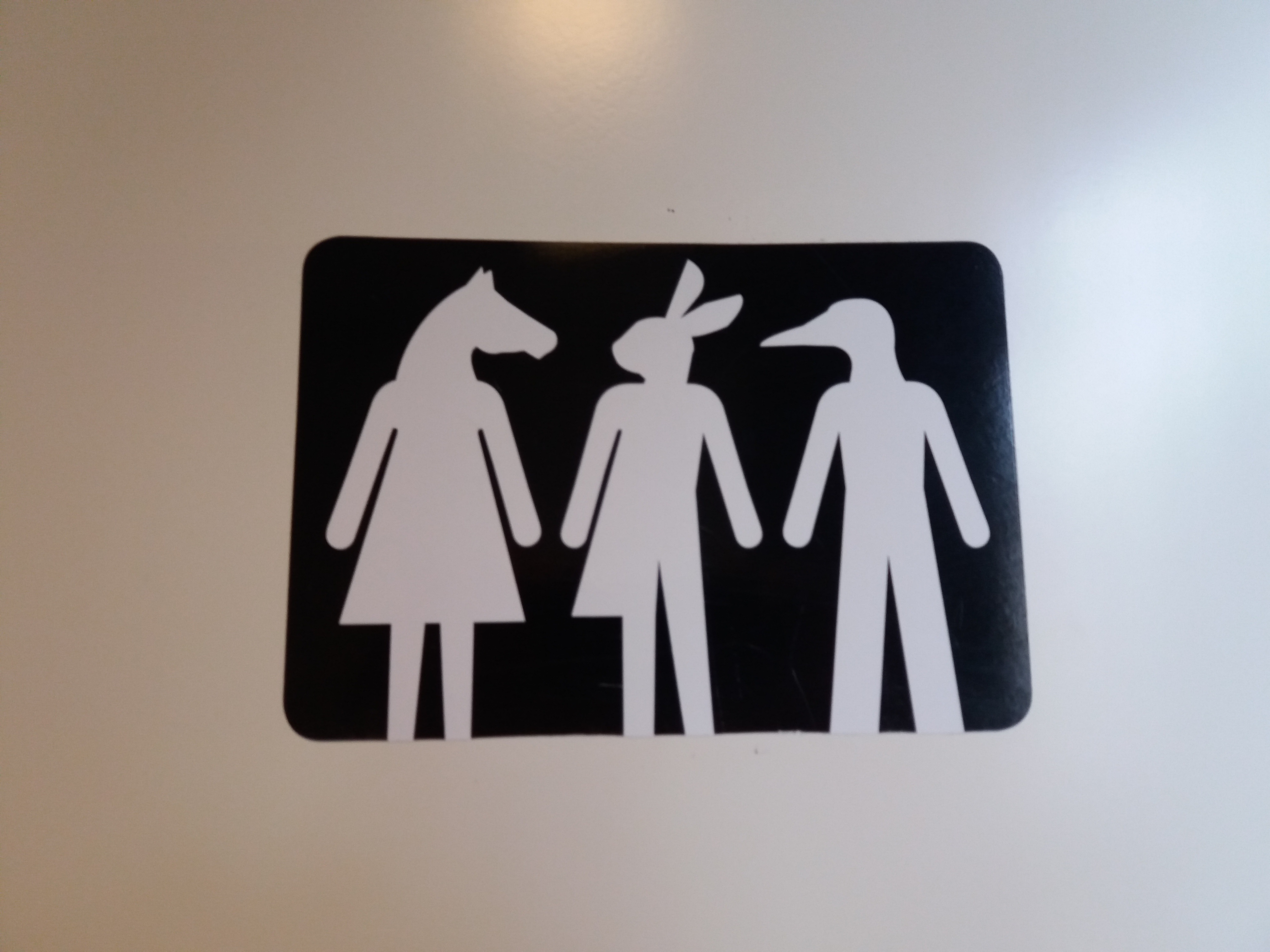 gender natural toilet sign